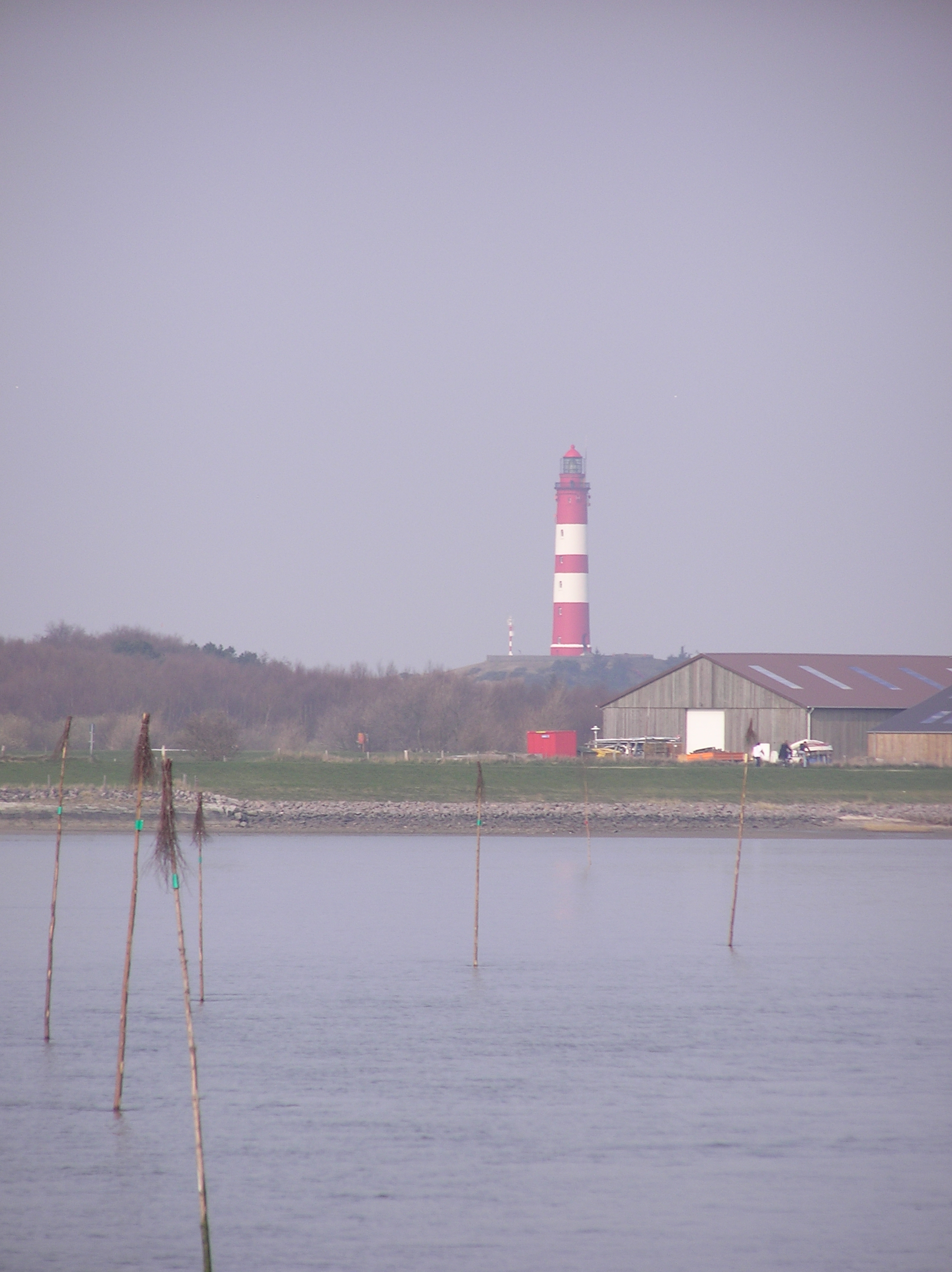 Pricken zwischen Witdün und Steenodde (Amrum)